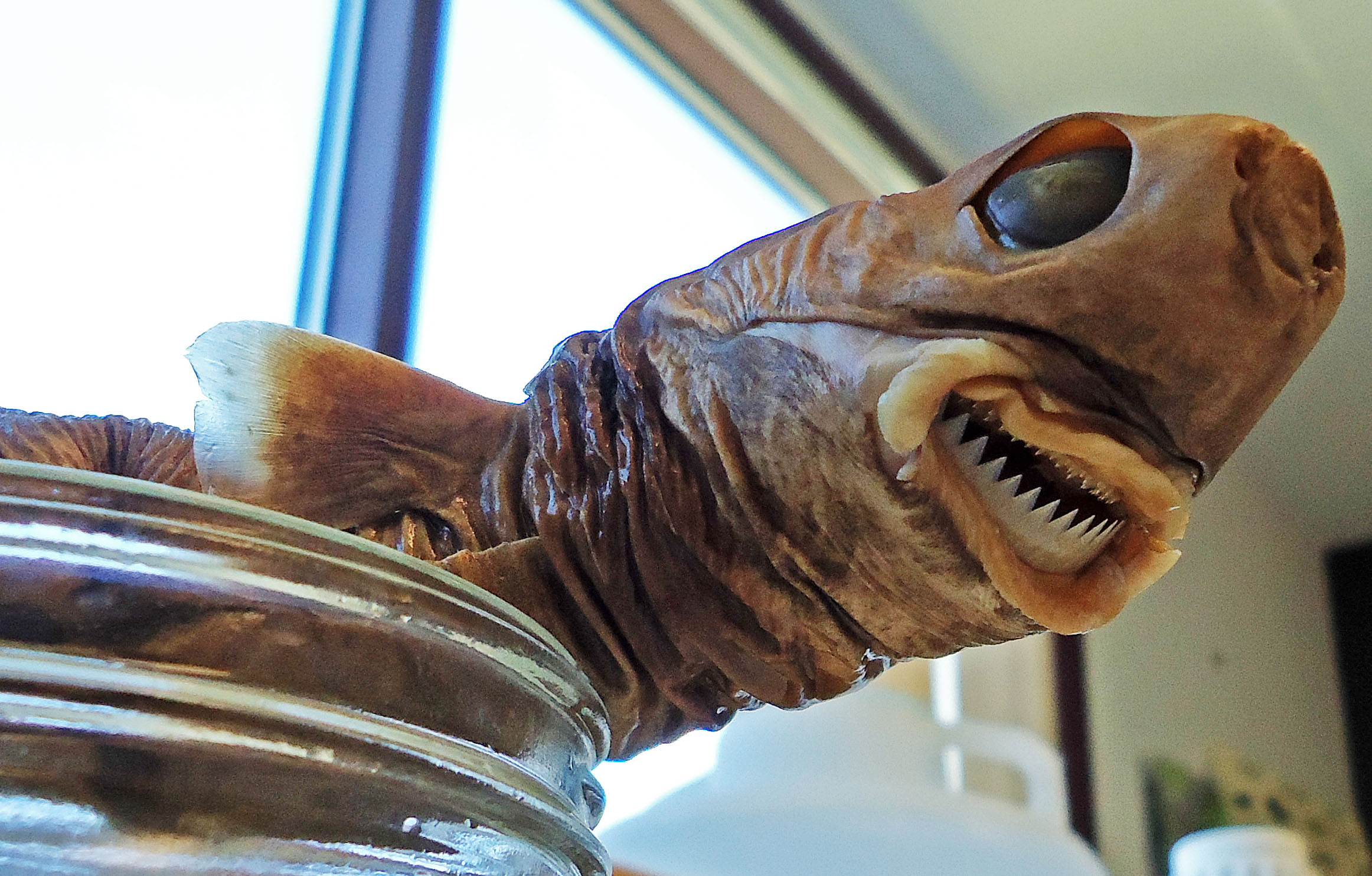 Isistius brasiliensis